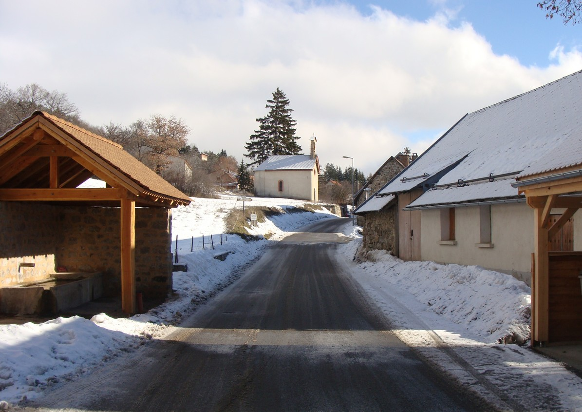 La route de Saint-Bonnet à Chaillol au hameau du Chanet, commune de Saint-Julien-en-Champsaur.